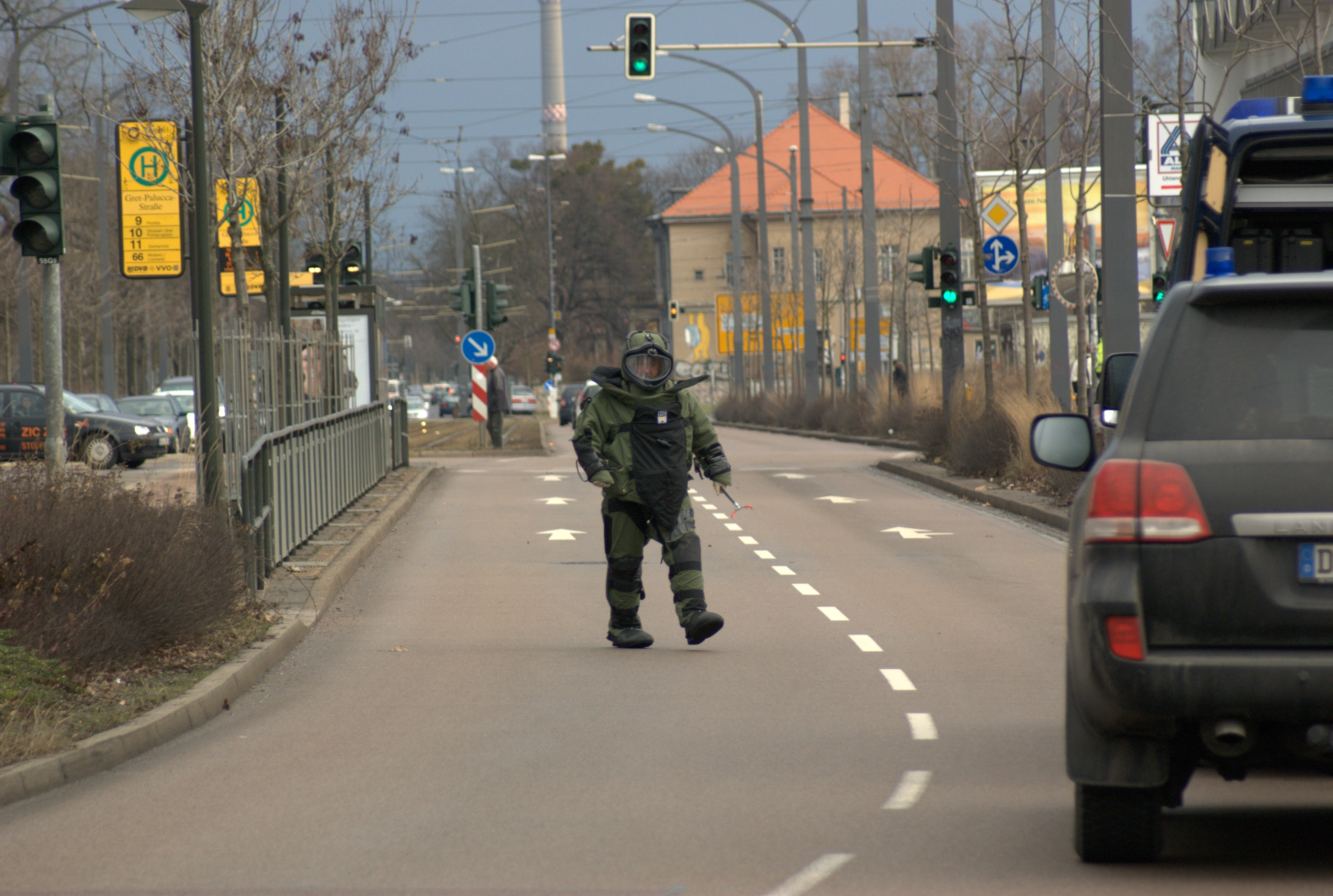 Original Flickr-Beschreibung: Da tickte wohl ein Mülleimer an der Straßenbahnhaltestelle Dresden "Gret-Palucca-Straße".